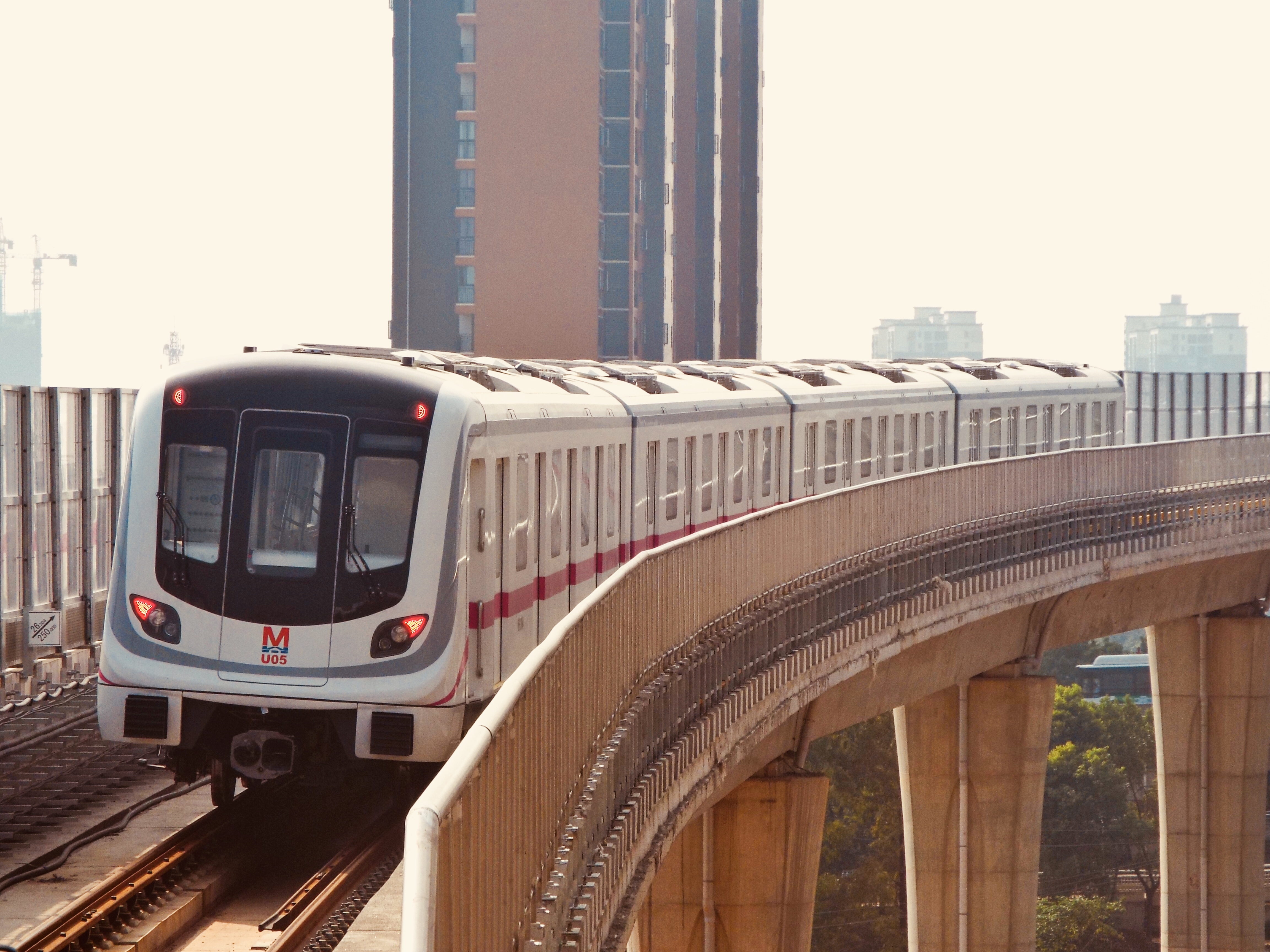 武汉轨道交通阳逻线列车